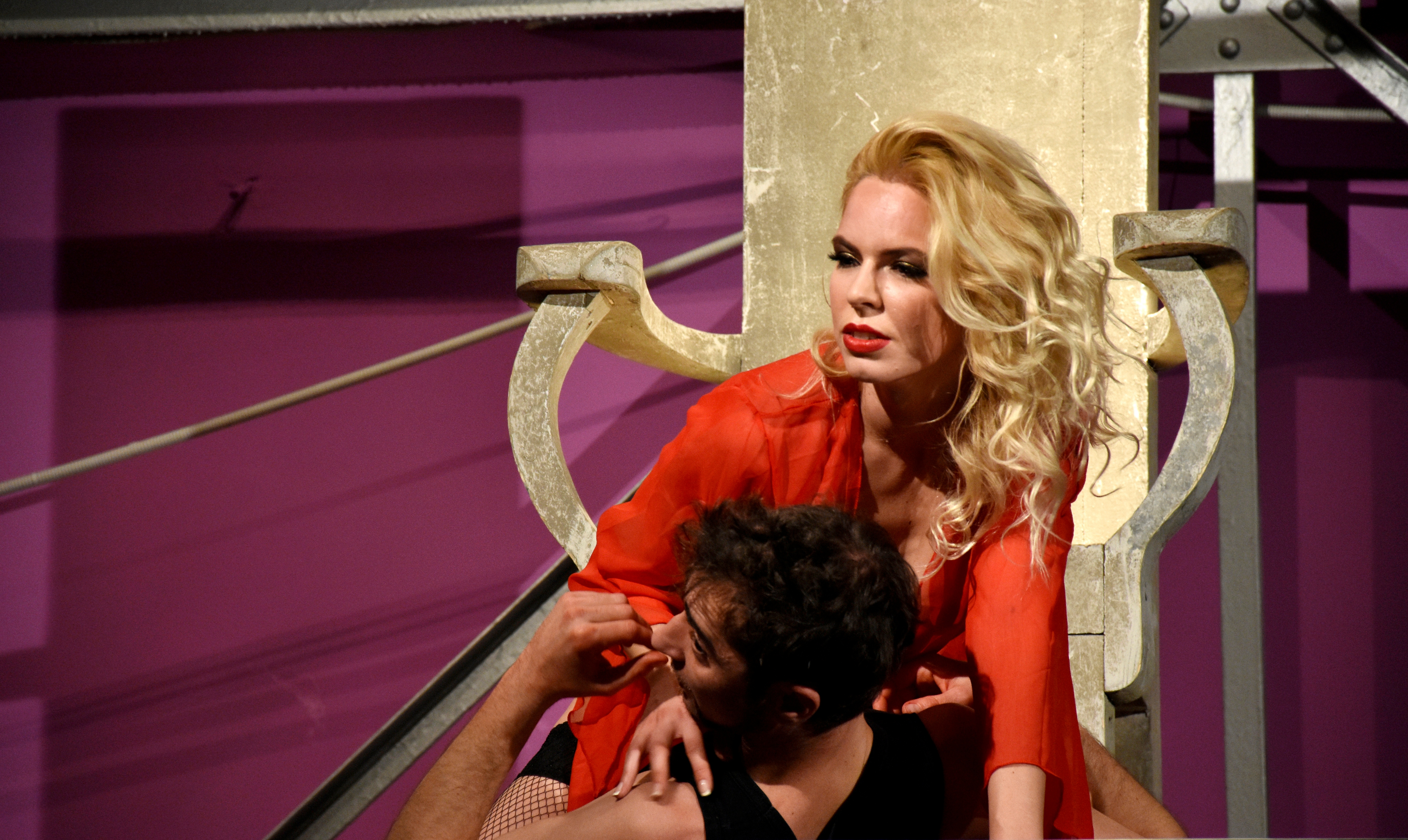 Müller Fanny és Dolmány Attila. Kárpáti Levente A Caligula-klán című előadásán.